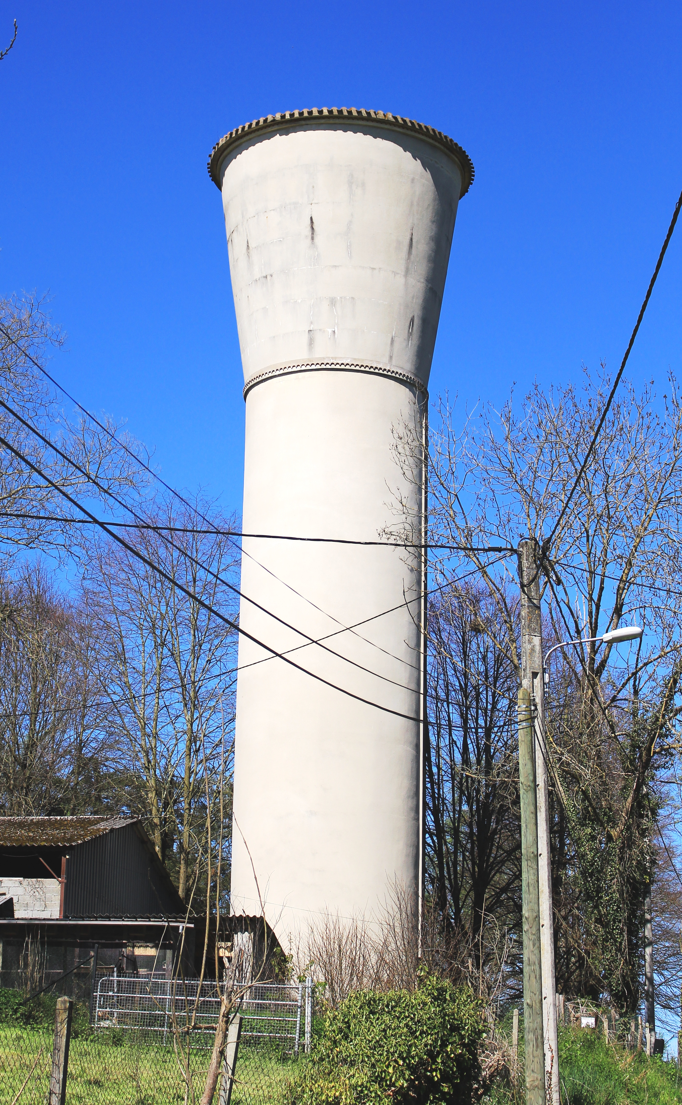 Château d'eau de Lamarque-Pontacq (Hautes-Pyrénées)